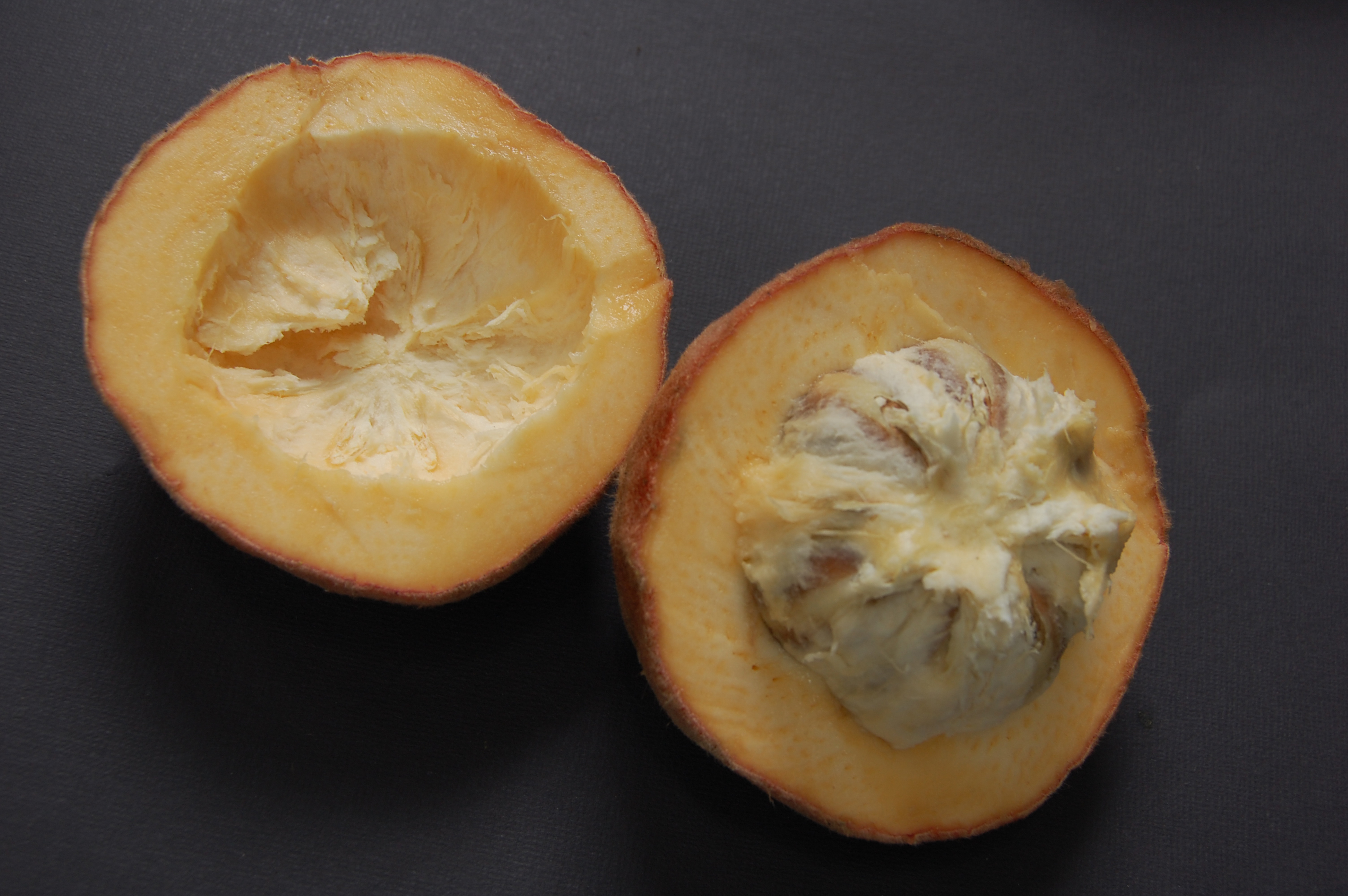 Buah Bisbul (Bahasa Indonesia), Buah Mentega (Bahasa Melayu), Mabolo (English), Diospyros blancoi